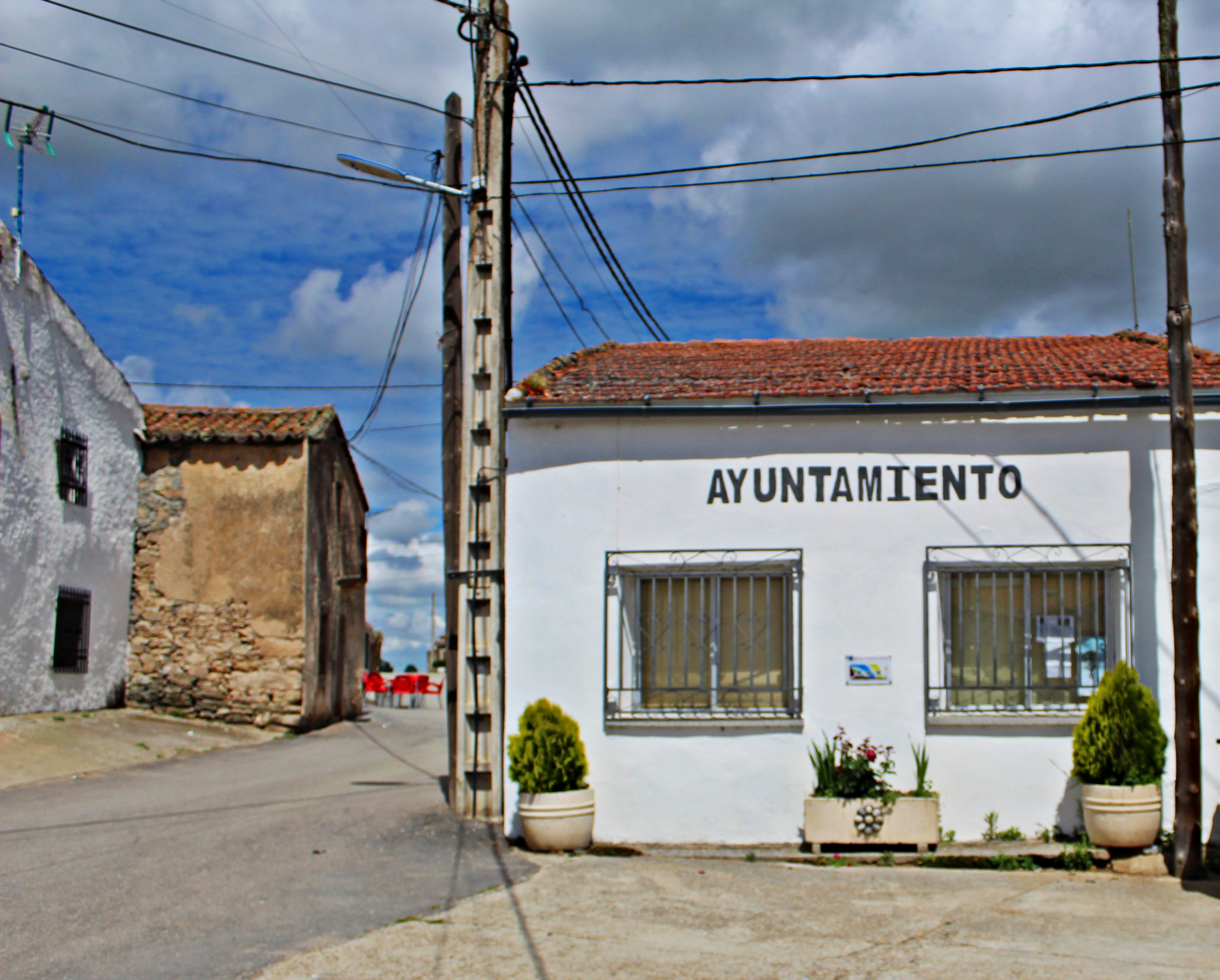 Ayuntamiento de Santa María de Sando, provincia de Salamanca.